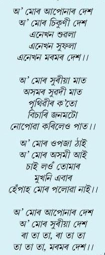 অসমীয়া: বেজবৰুৱাই লিখা অসমৰ জাতীয় সংগীতৰ মূল ৰূপ